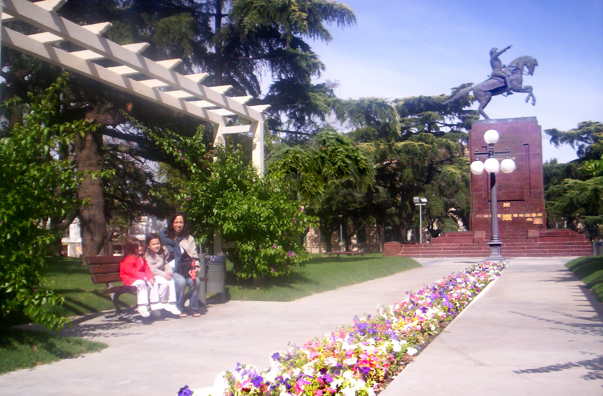 Plaza 25 de Mayo, en Junín, Argentina.